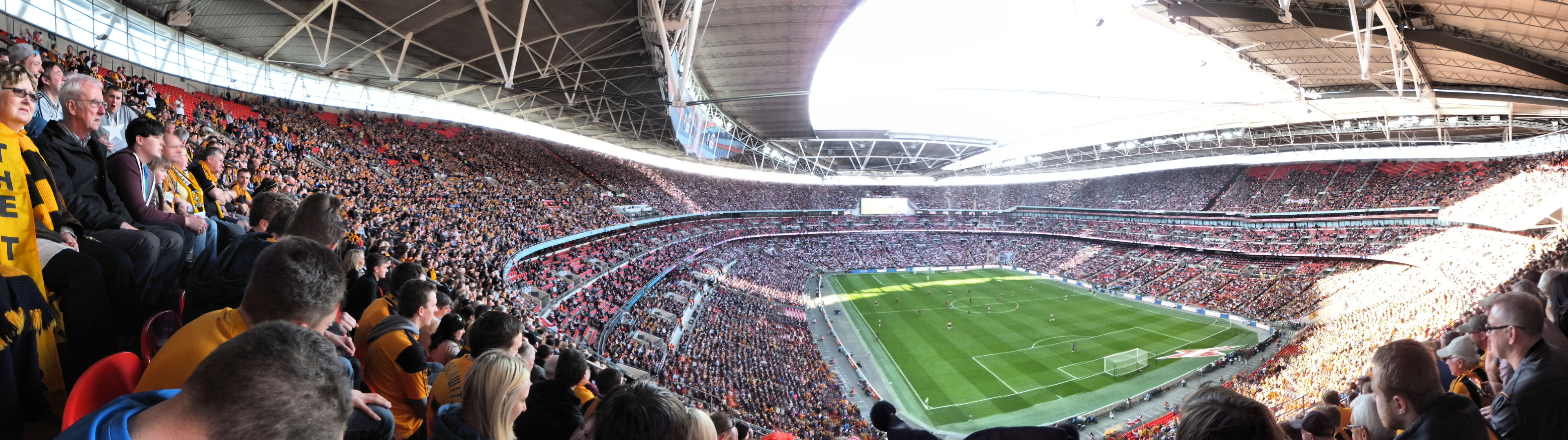 Blades 3-5 Tigers